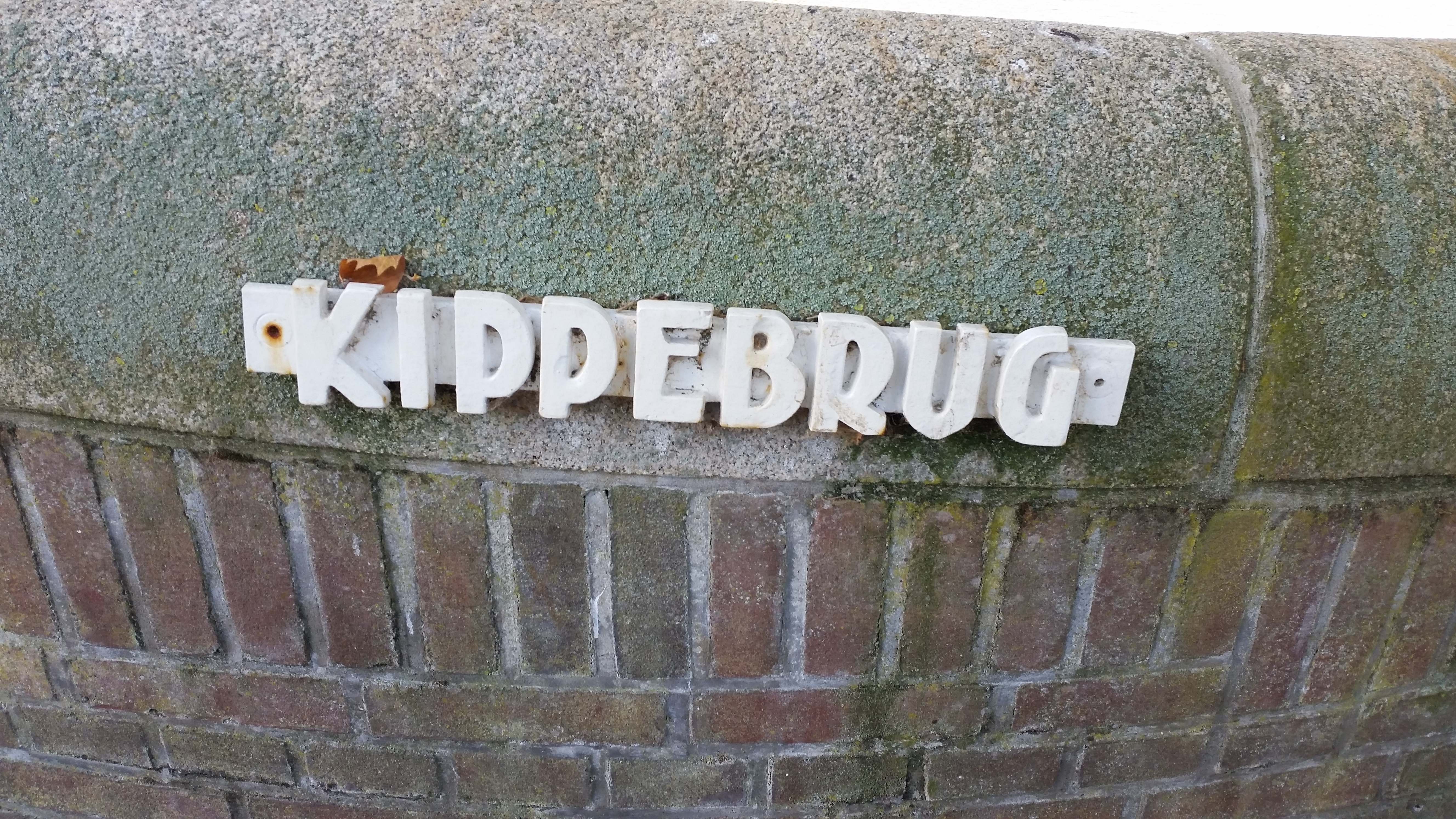 Naamplaat van Brug 270, Kippebrug